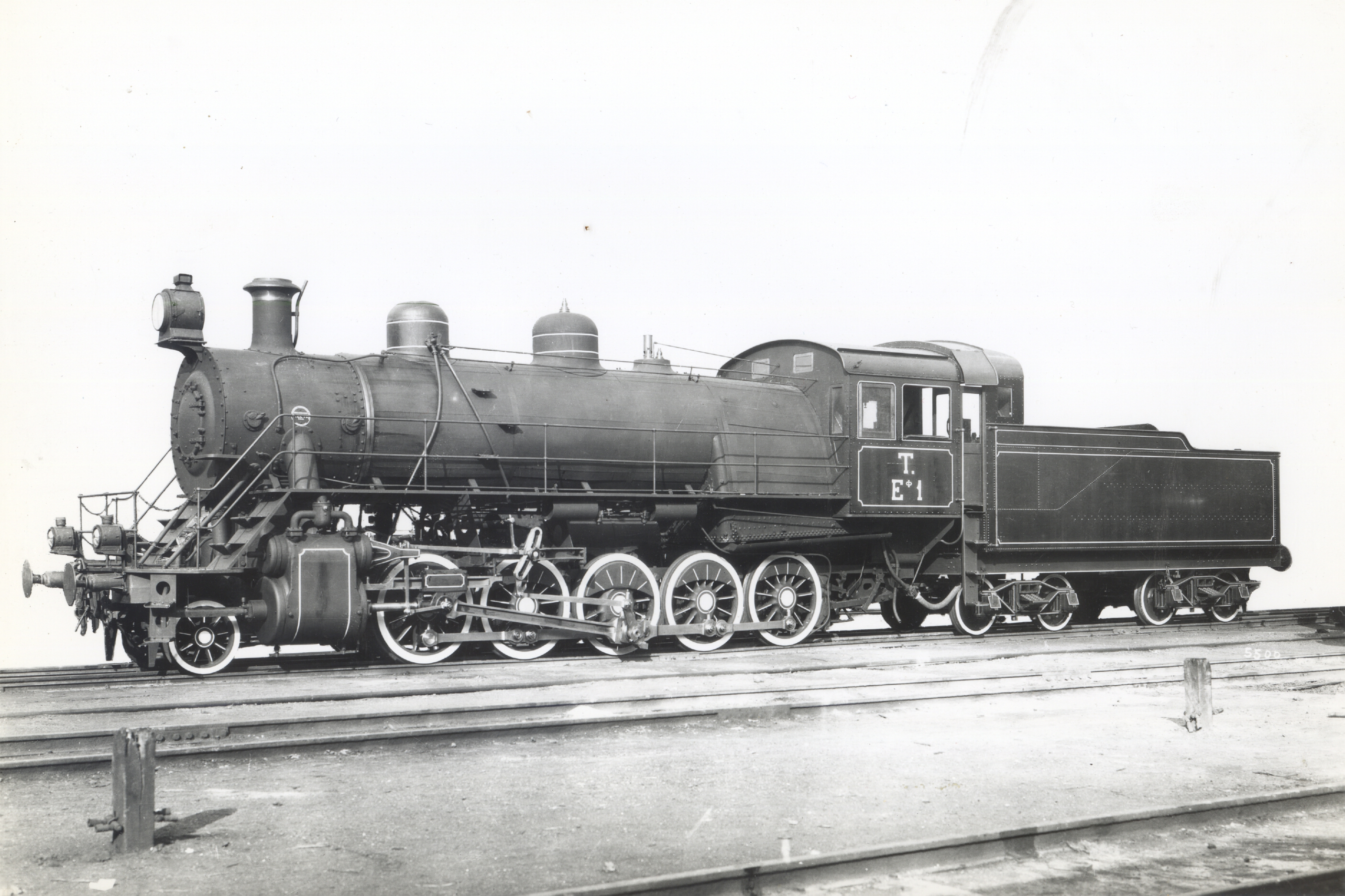 Паровоз ЕФ1 на заводе Baldwin Locomotive Works